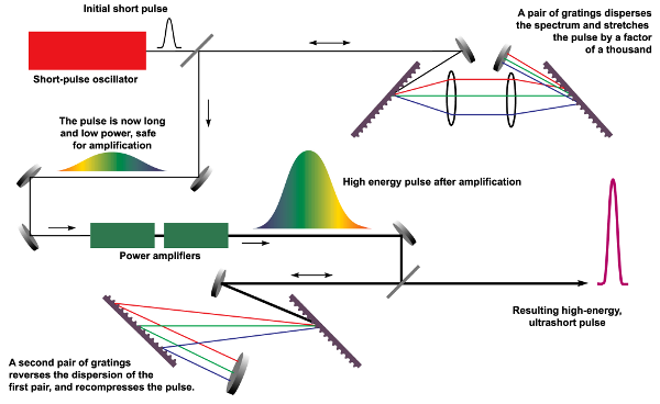 Esquema de funcionamiento del proceso CPA